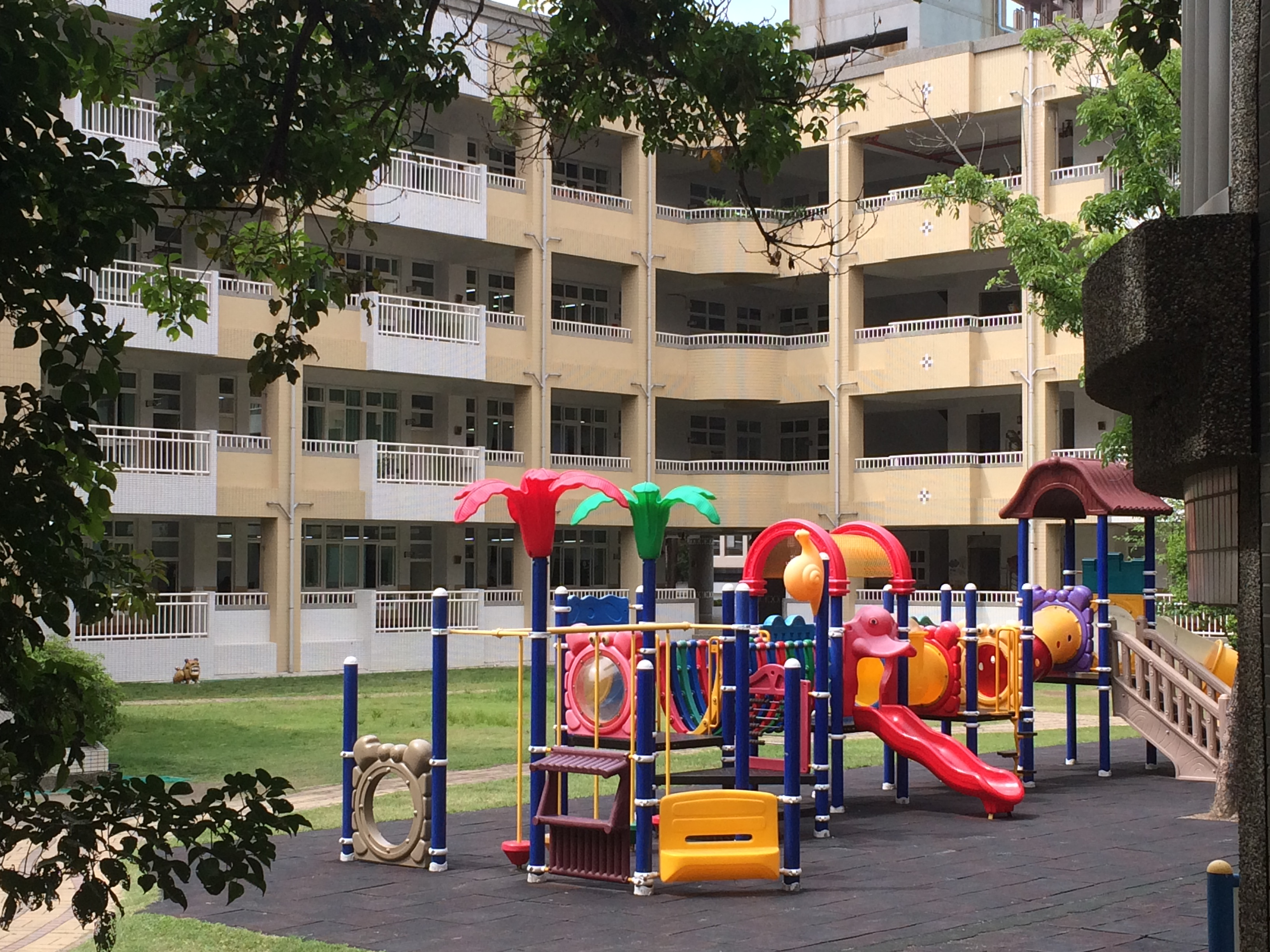 中文（台灣）: 本圖為新光國小之中庭校舍。